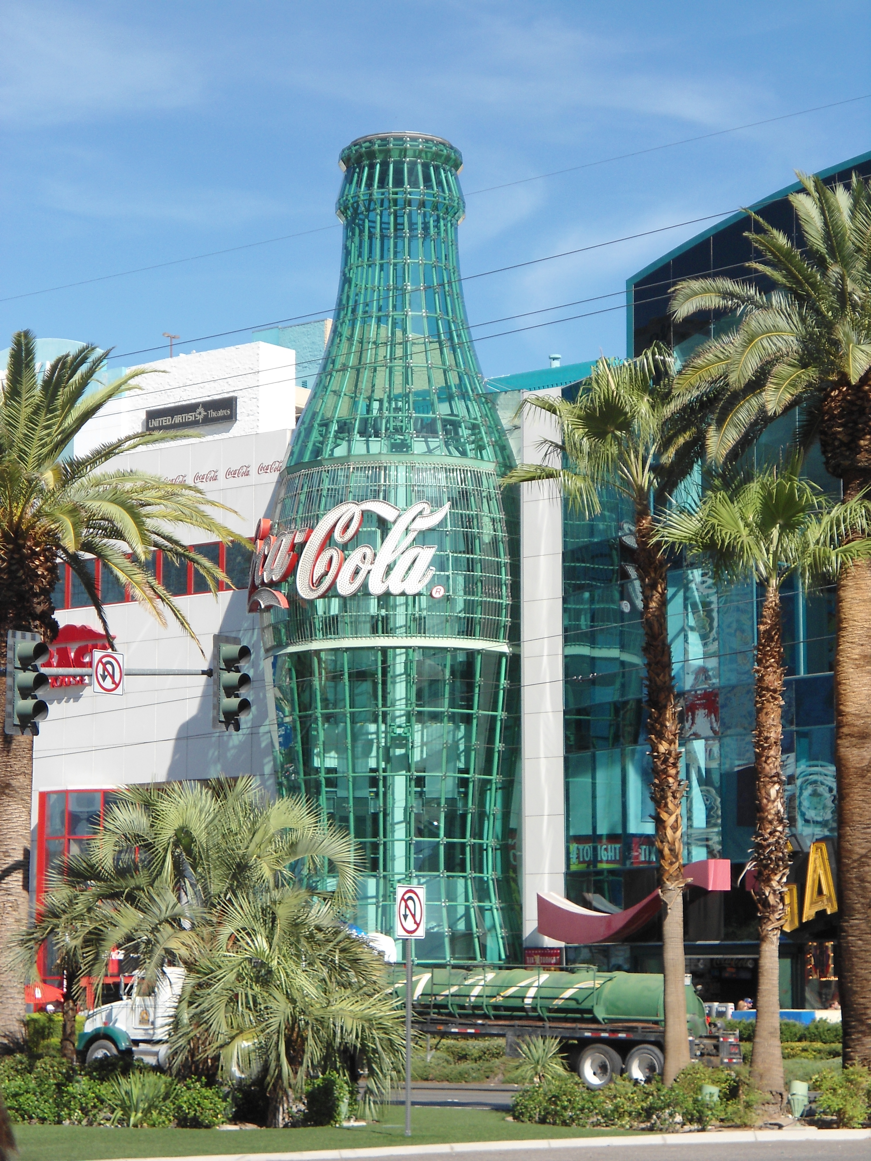 Coca-Cola Store